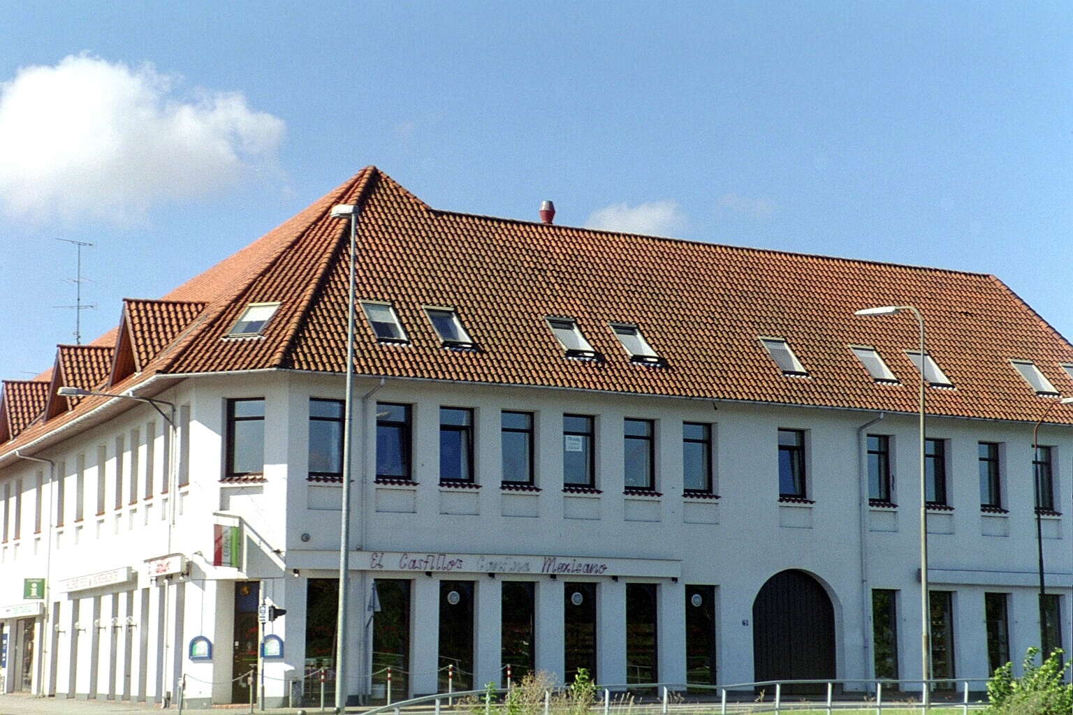 Ny Leidersdorf som det ser ud i år 2009.